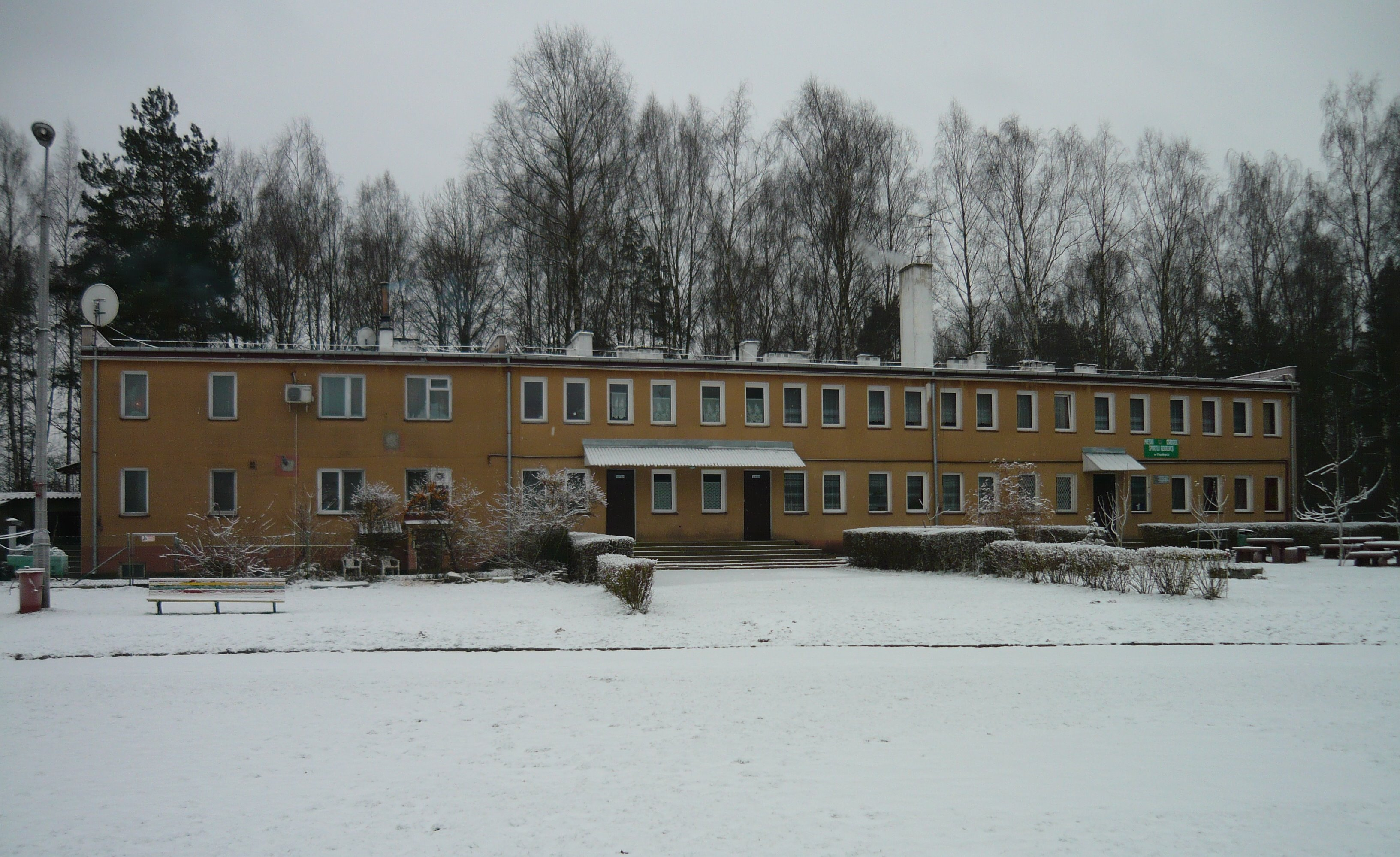 Budynek klubu LKS Promień Mońki - widok od boiska głównego